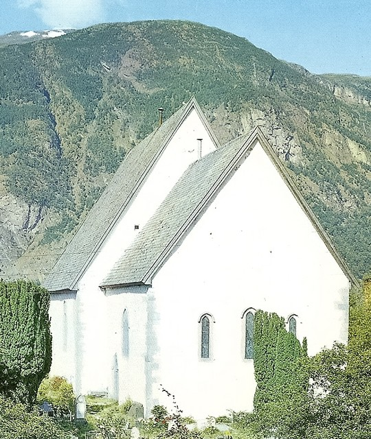 Vangen kirke